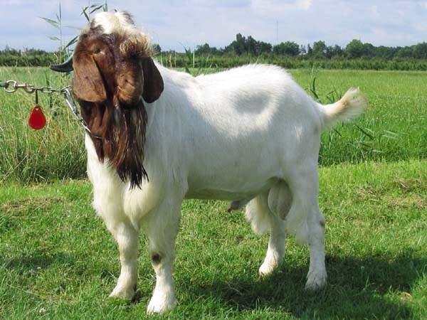 Boerbok Categorie:Afbeelding geit